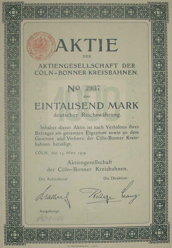 Aktie der Köln-Bonner Kreisbahnen von 1909, Eigenes Foto einer eigenen Aktie, Hans Schlieper, 31. Mai 2006.